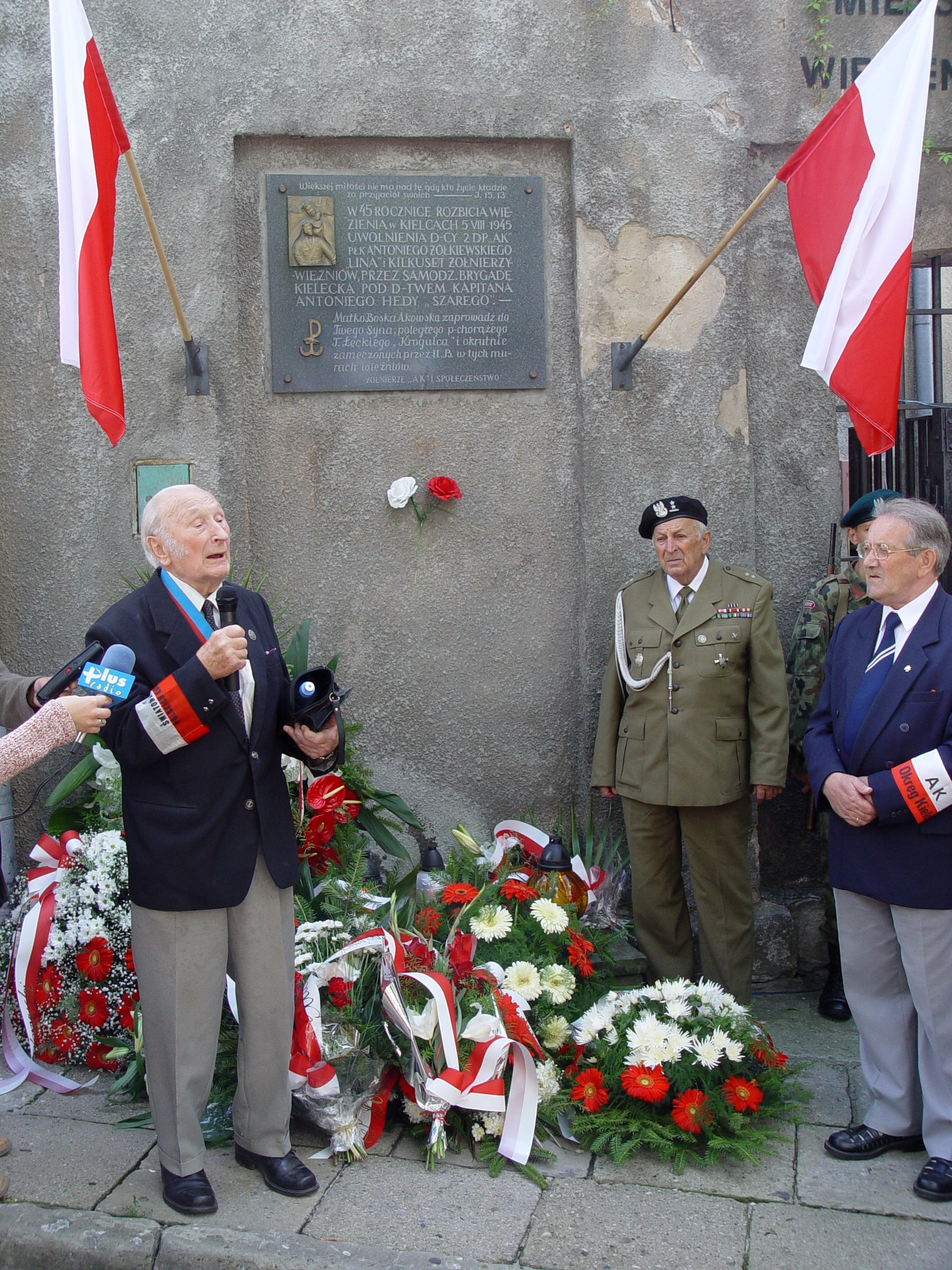 Antoni Heda-Szary pod tablicą pamiatkową,Kielce 2005-08-07, 60-rocznica rozbicia więzienia kieleckiego (lokalizacja zdjęcia